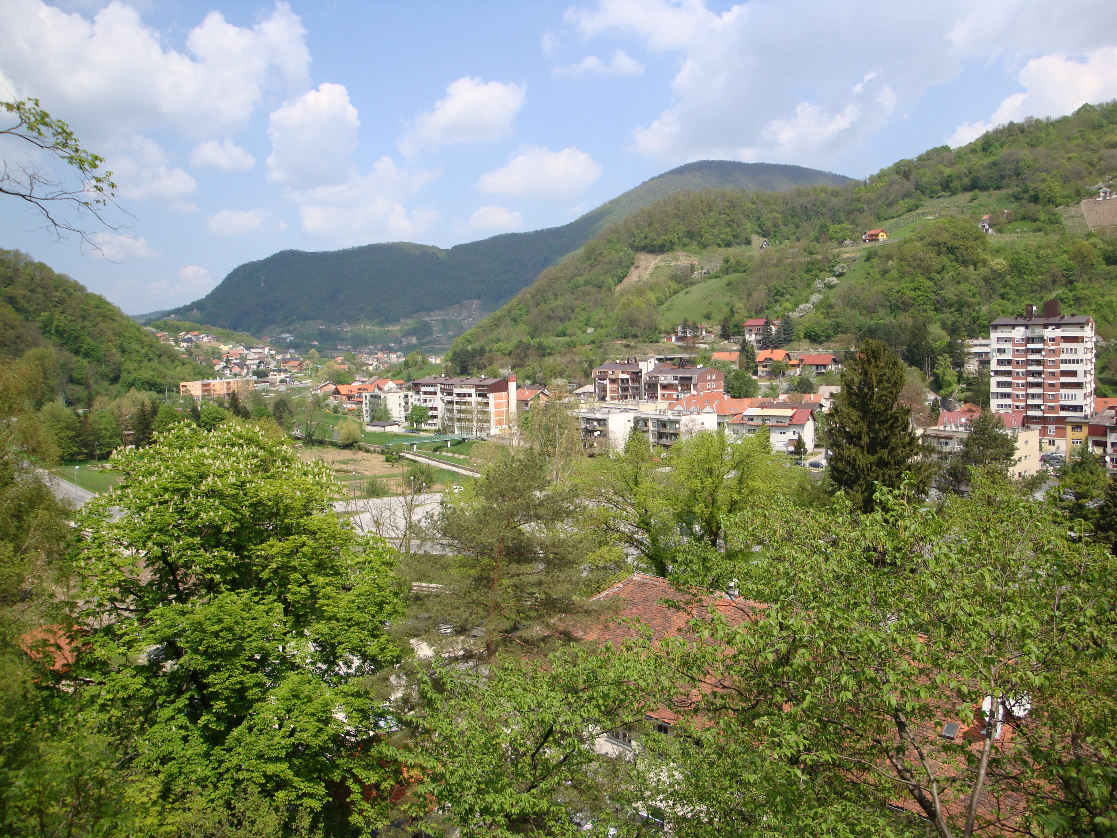 Krapina.